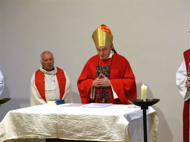 Mgr Dick Schoon, évêque vieux-catholique de Haarlem (Pays-Bas) en visite en France en juin dernier pendant la messe au côté du Père Bernard Vignot, prêtre vieux-catholique français.